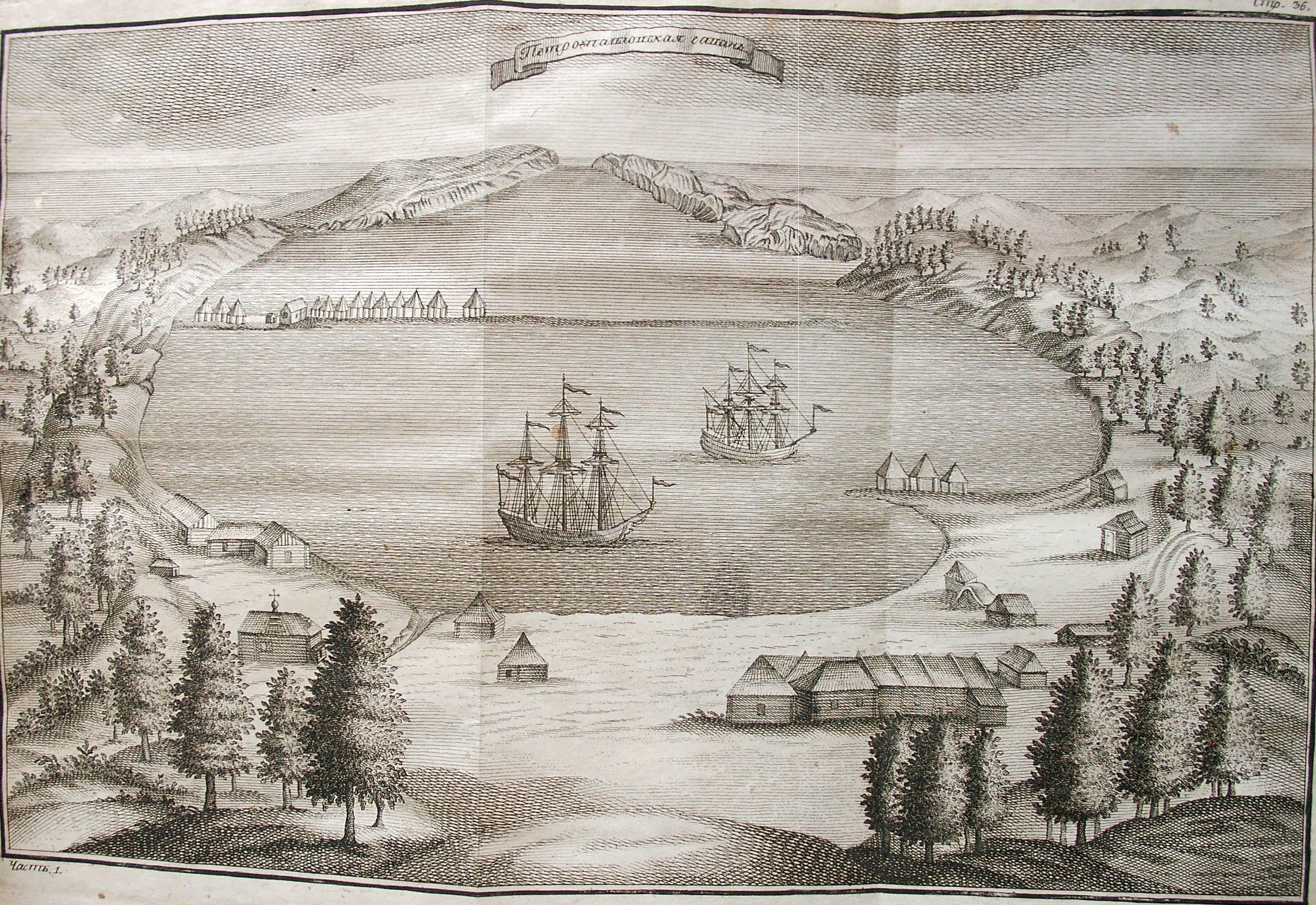 Гравюра Петропавловска-Камчатского, XVIII век